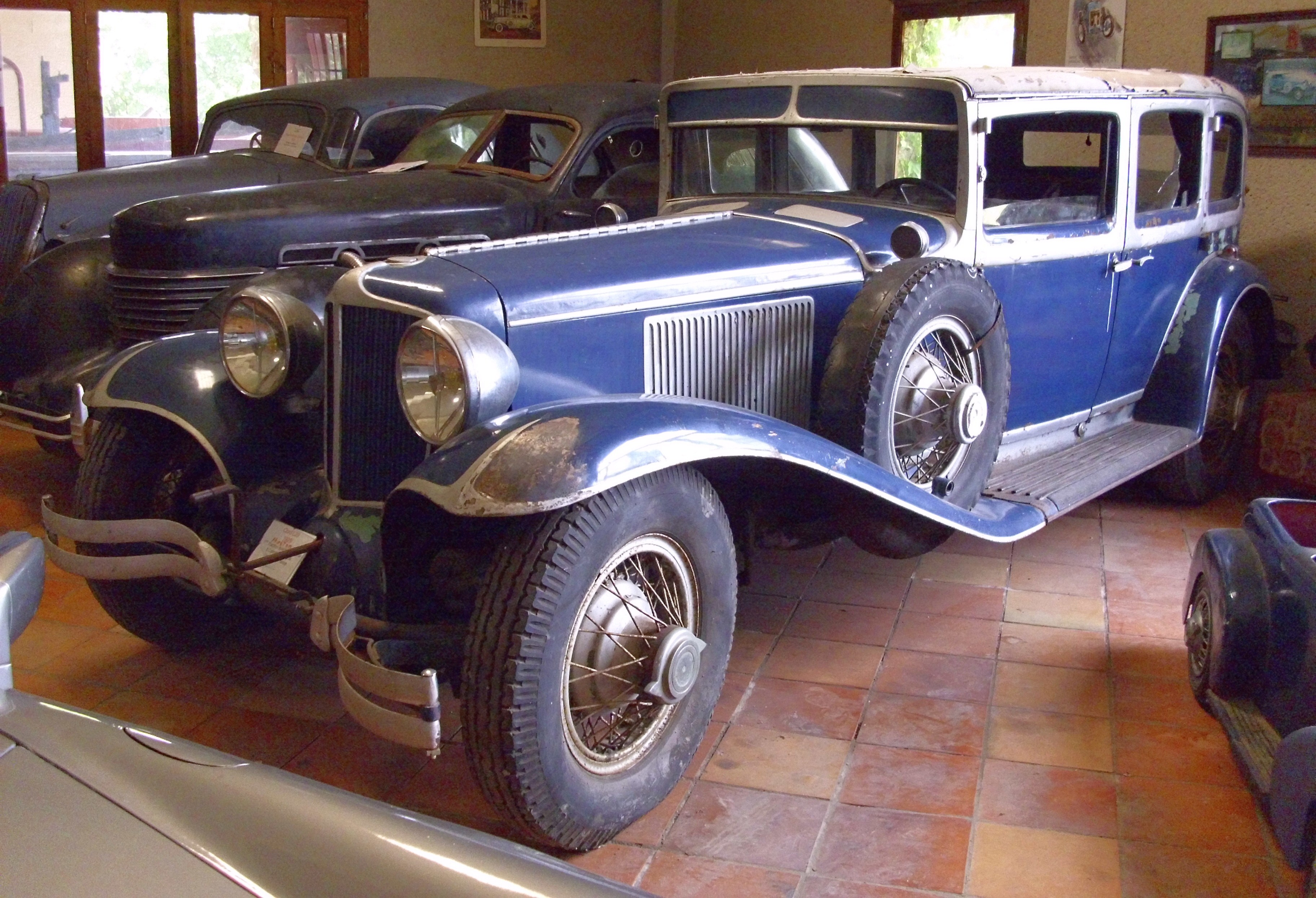 Cord L-29 von 1929 im Musée de Sanxet.